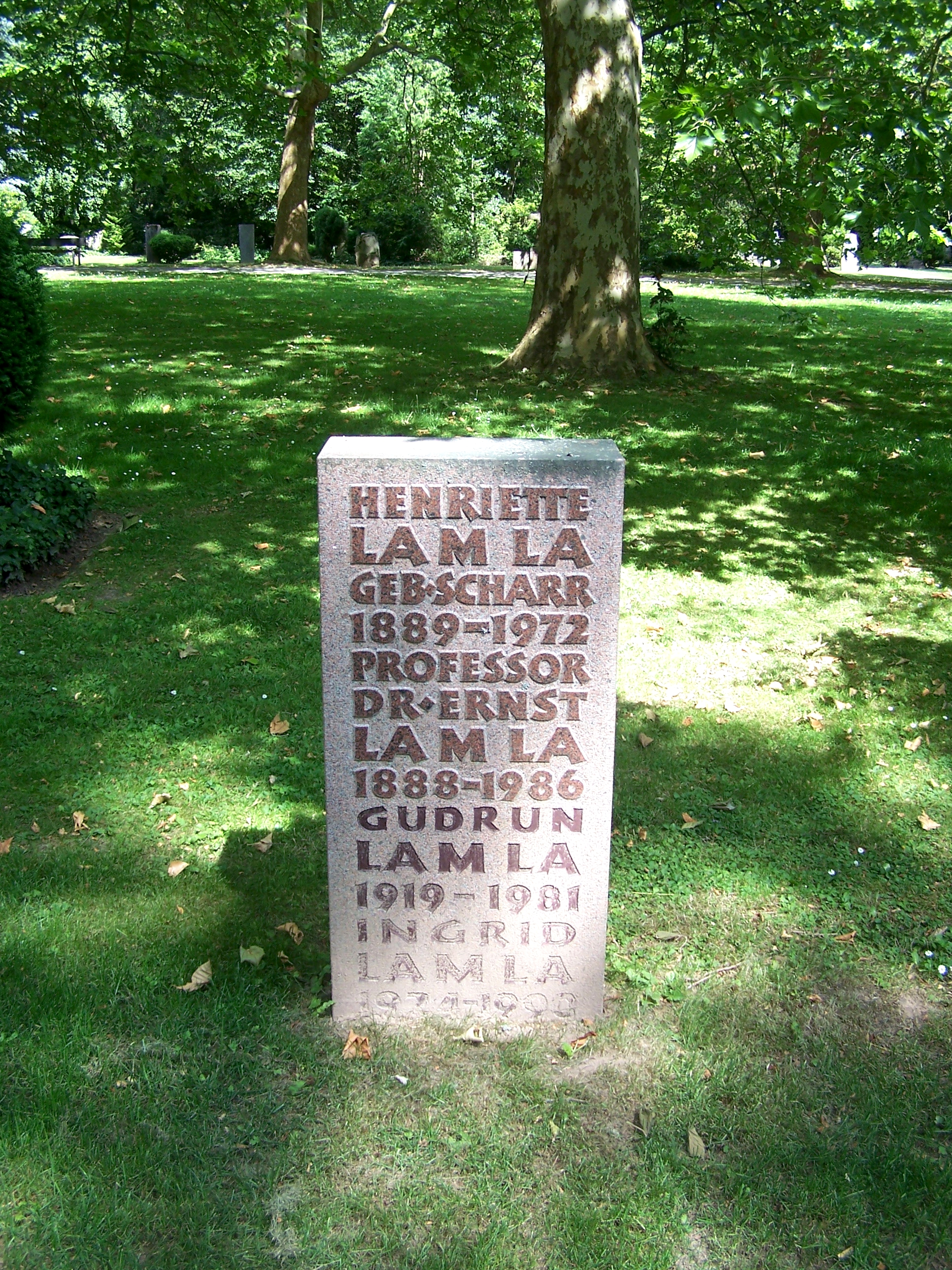 Grab von Ernst Lamla auf dem Stadtfriedhof zu Göttingen